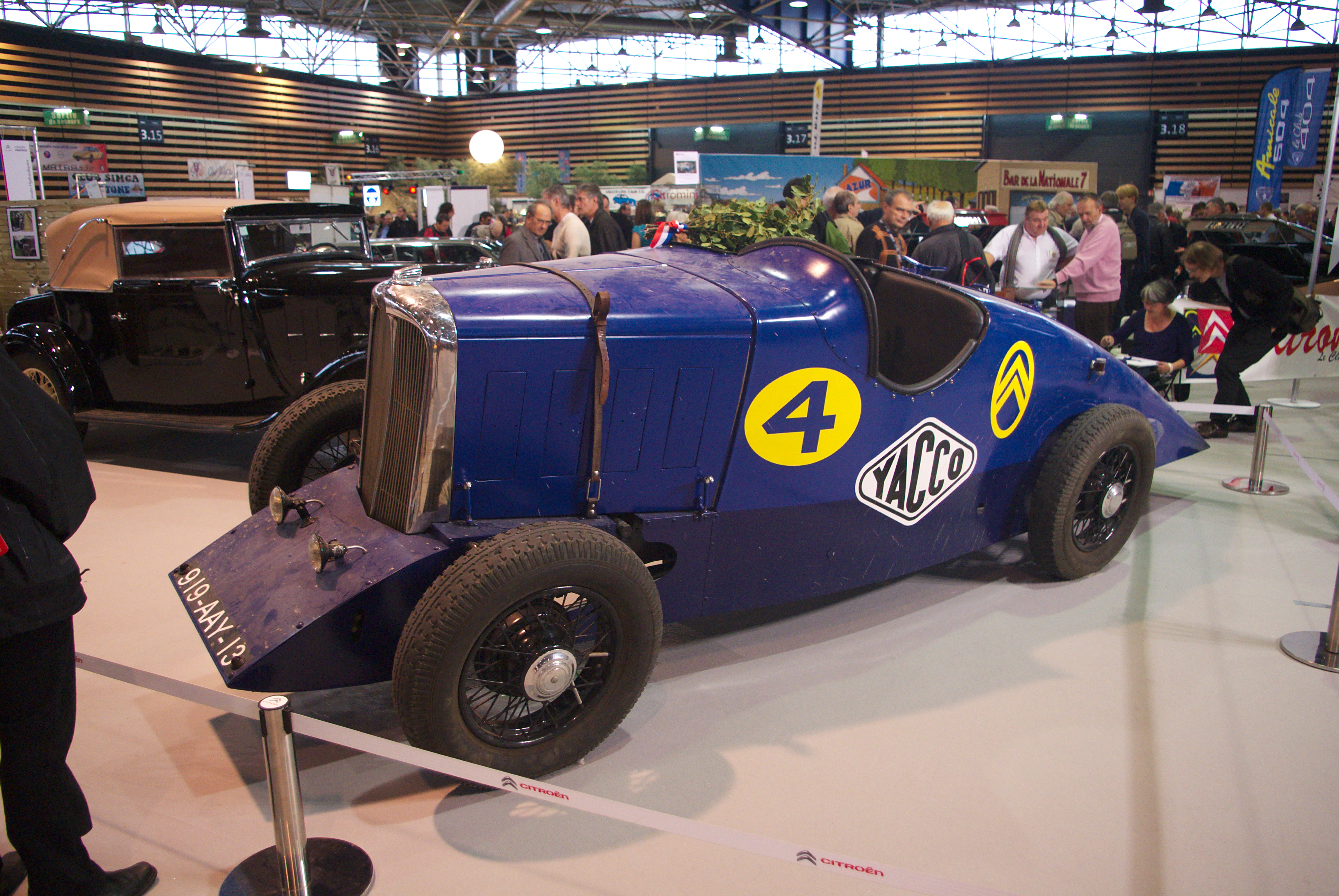 8CV Citroën à Epoqu'auto 2012